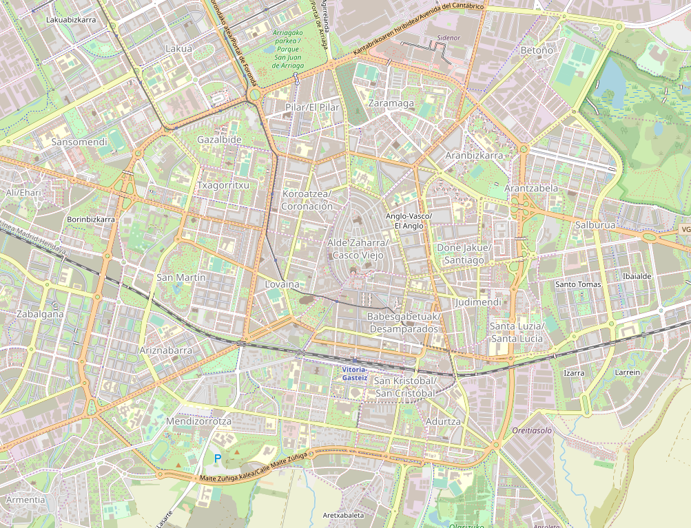 Gasteiz hiriaren erdigunea. Araba, Euskal Herria - Gasteiz city´s center. Araba, Basque Country.